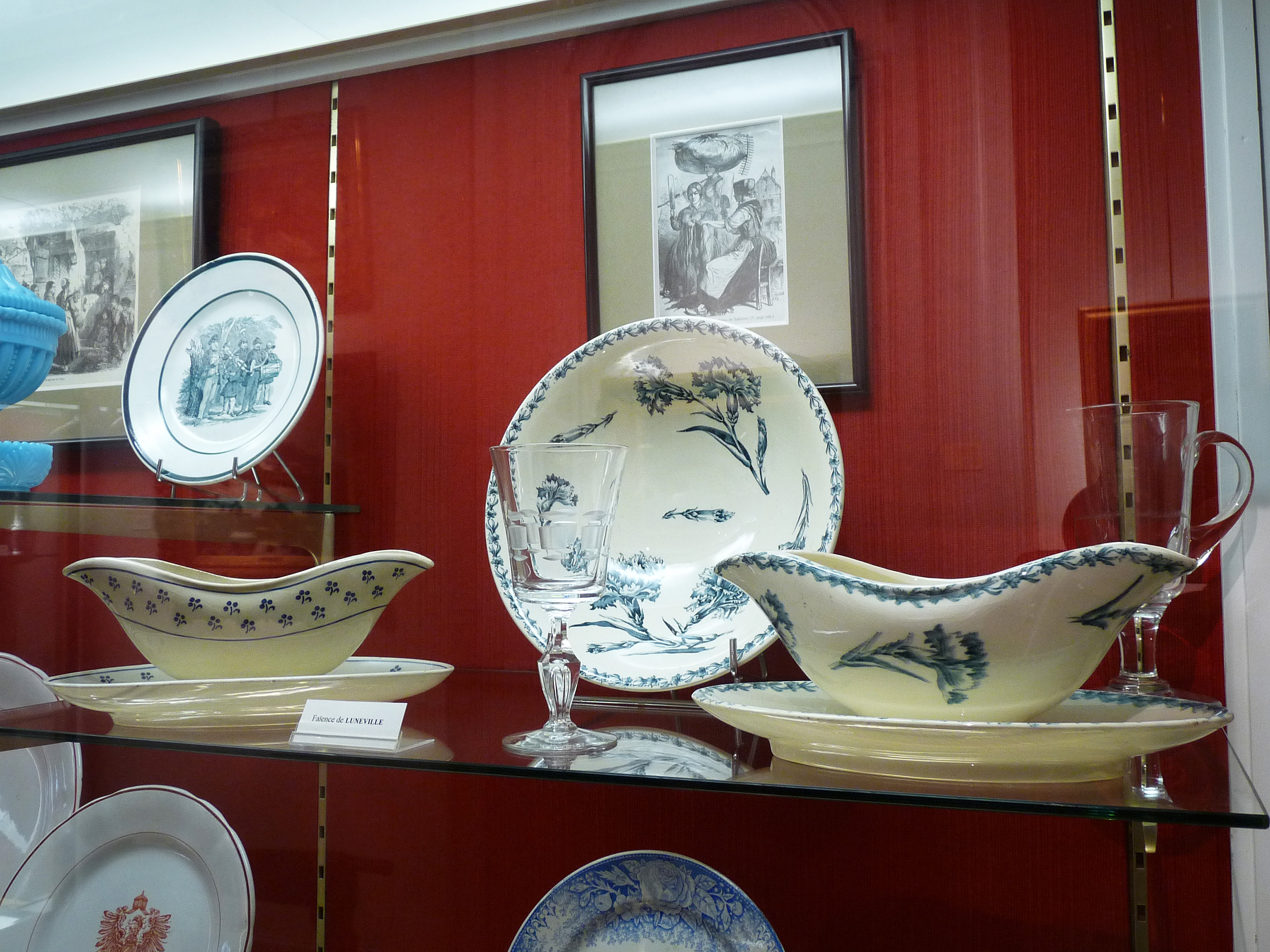 Faïence de Lunéville au Musée Charles de Bruyères